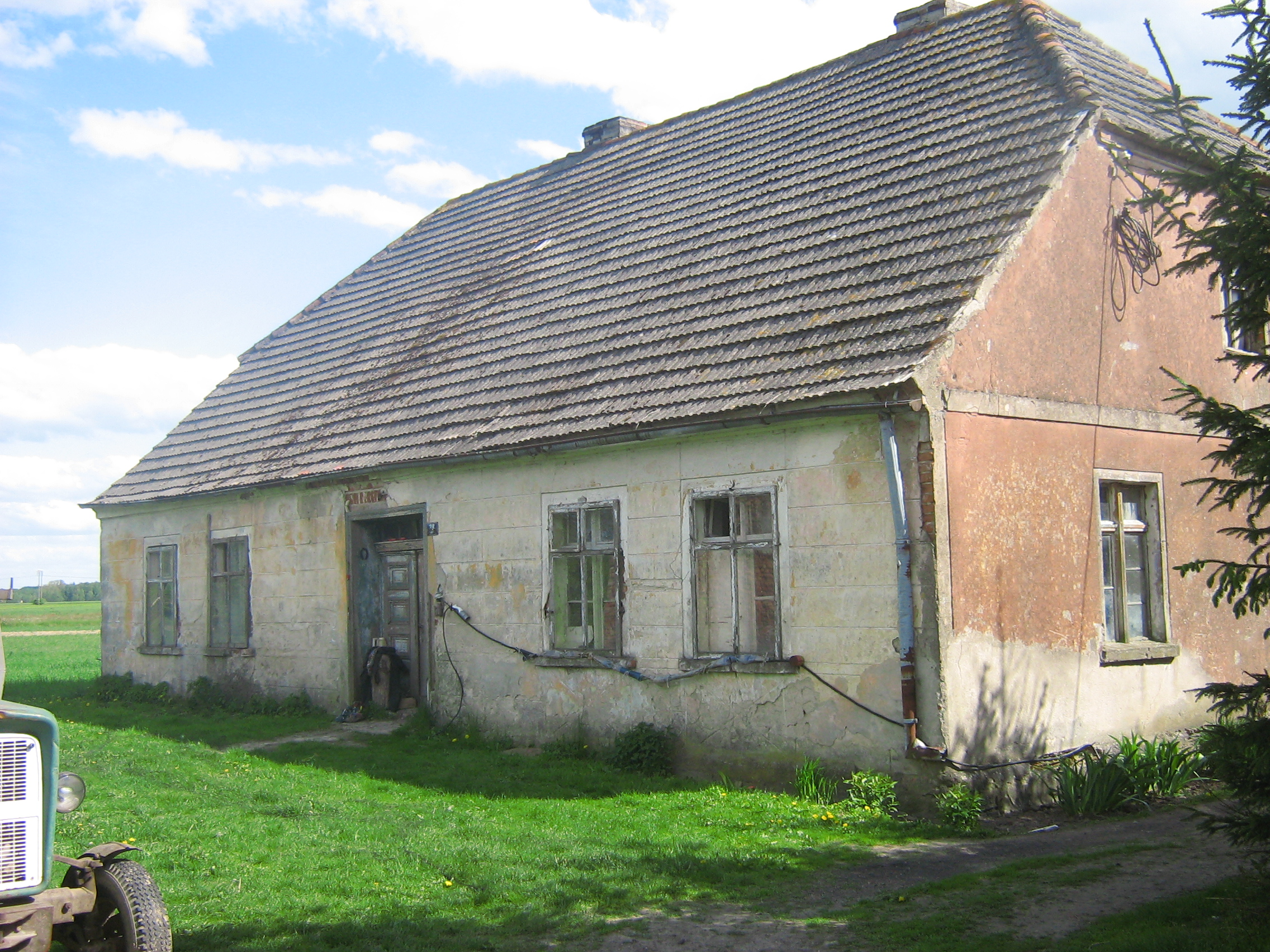 Zabytkowy dom z numerem 28